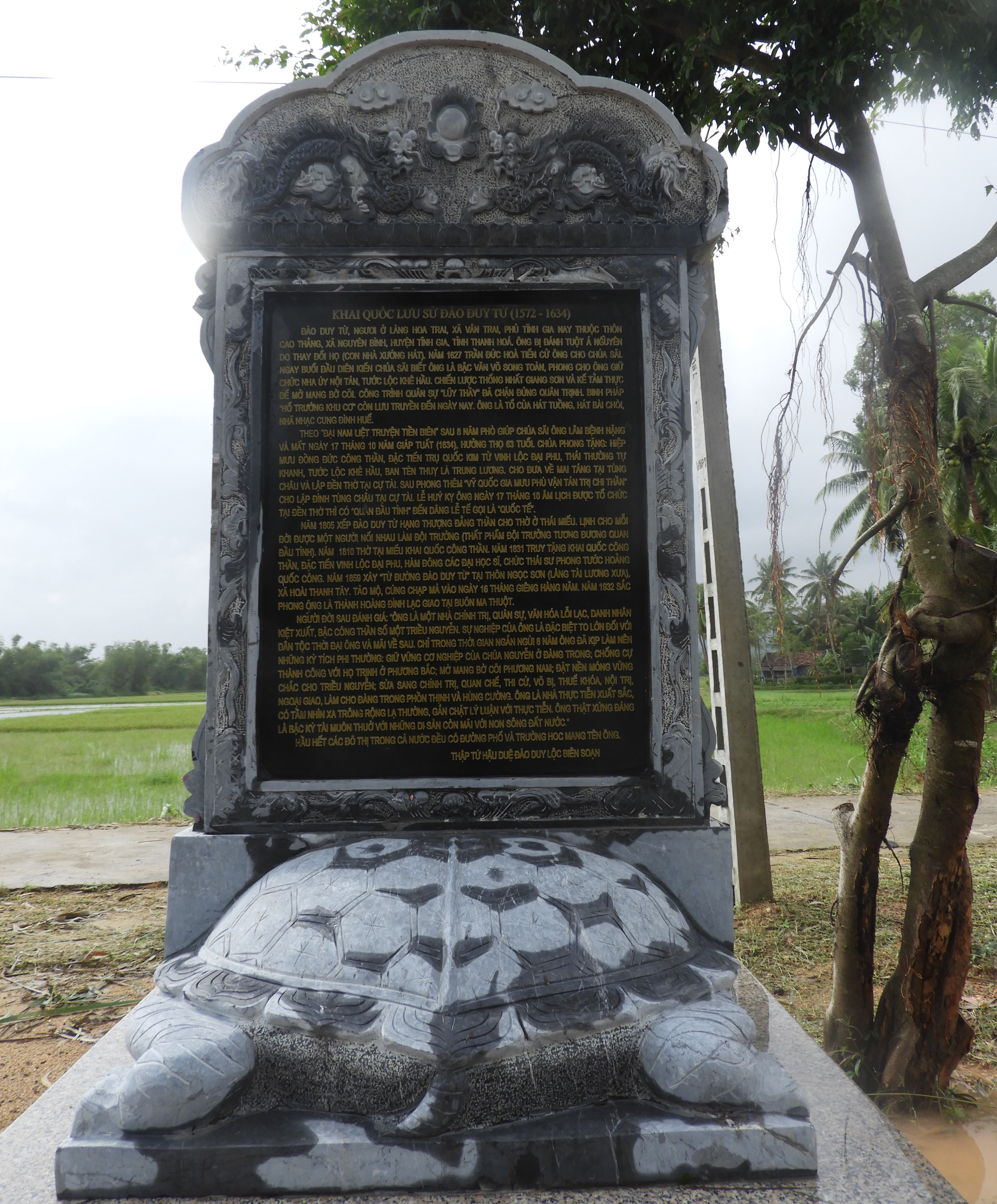 Bia tiểu sử Đào Duy Từ mặt sau tại đền thờ Đào Duy Từ, thôn Cự Tài, xã Hoài Phú, huyện Hoài Nhơn, tỉnh Bình Định